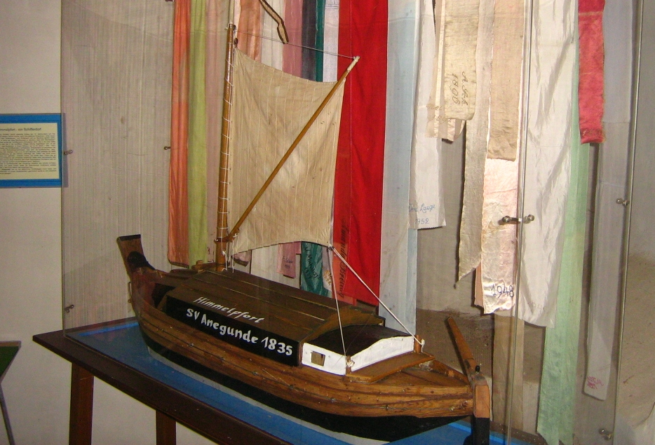 Ein Kaffenkahn: Modell in der Kirche des ehemaligen Klosters Himmelpfort (Stadt Fürstenberg, Brandenburg). Der Kaffenkahn ist ein historisches Binnenschiff des 17. und 18. Jahrhunderts auf den Binnengewässern zwischen Elbe und Oder in der Mark Brandenburg.